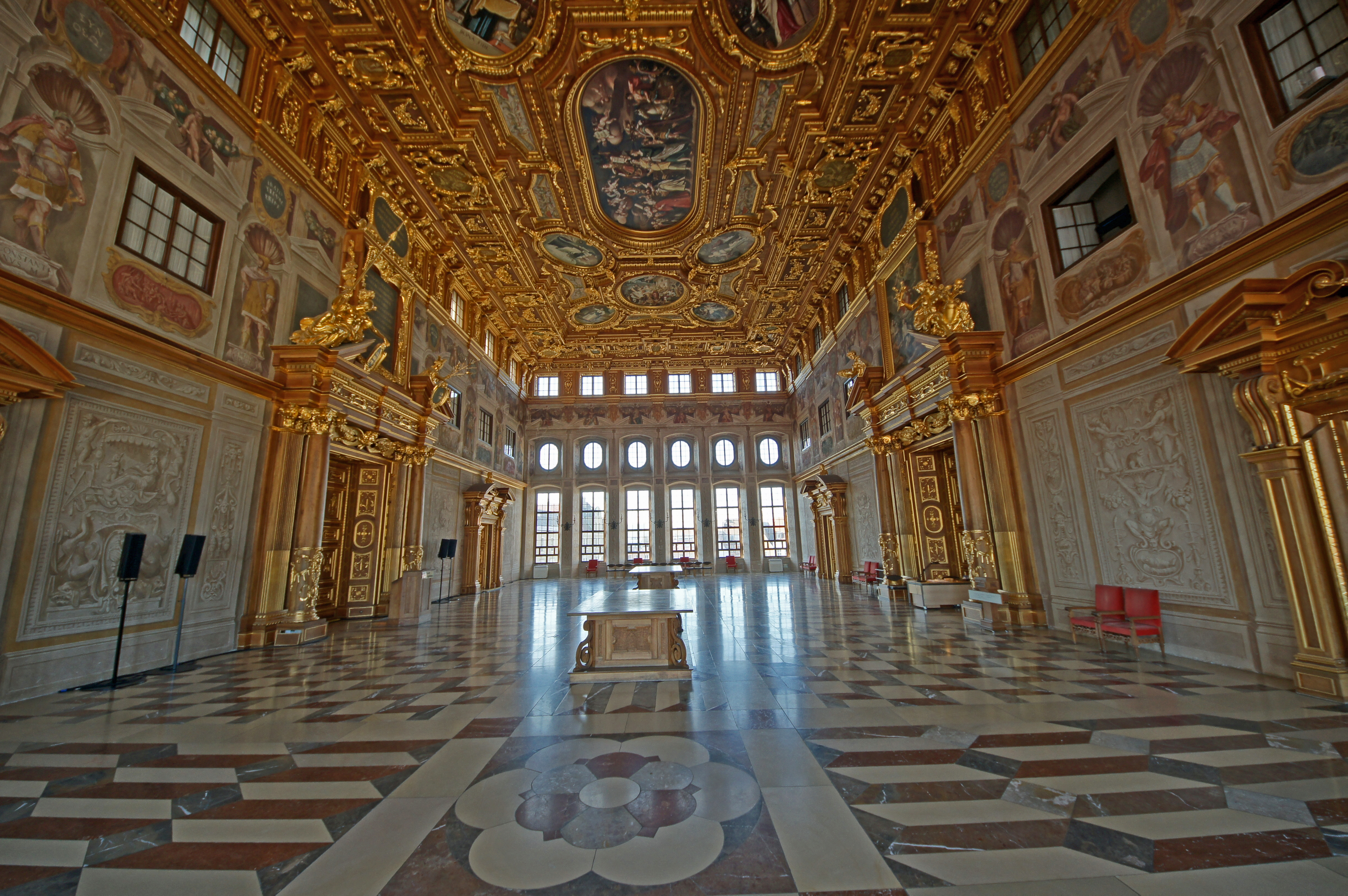 2011-02-26 Augsburg 006 Rathaus, Goldener Saal